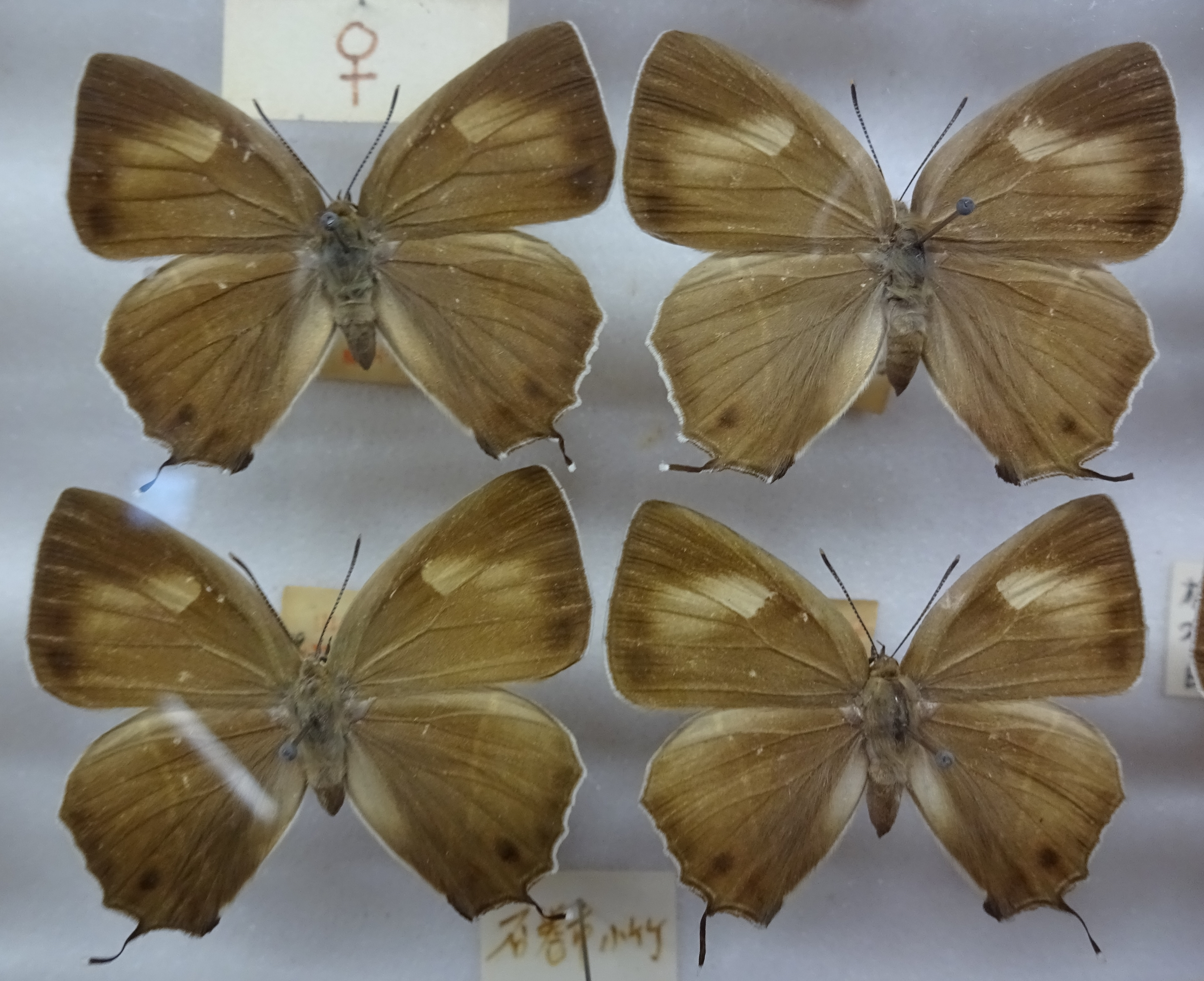 クロミドリシジミ